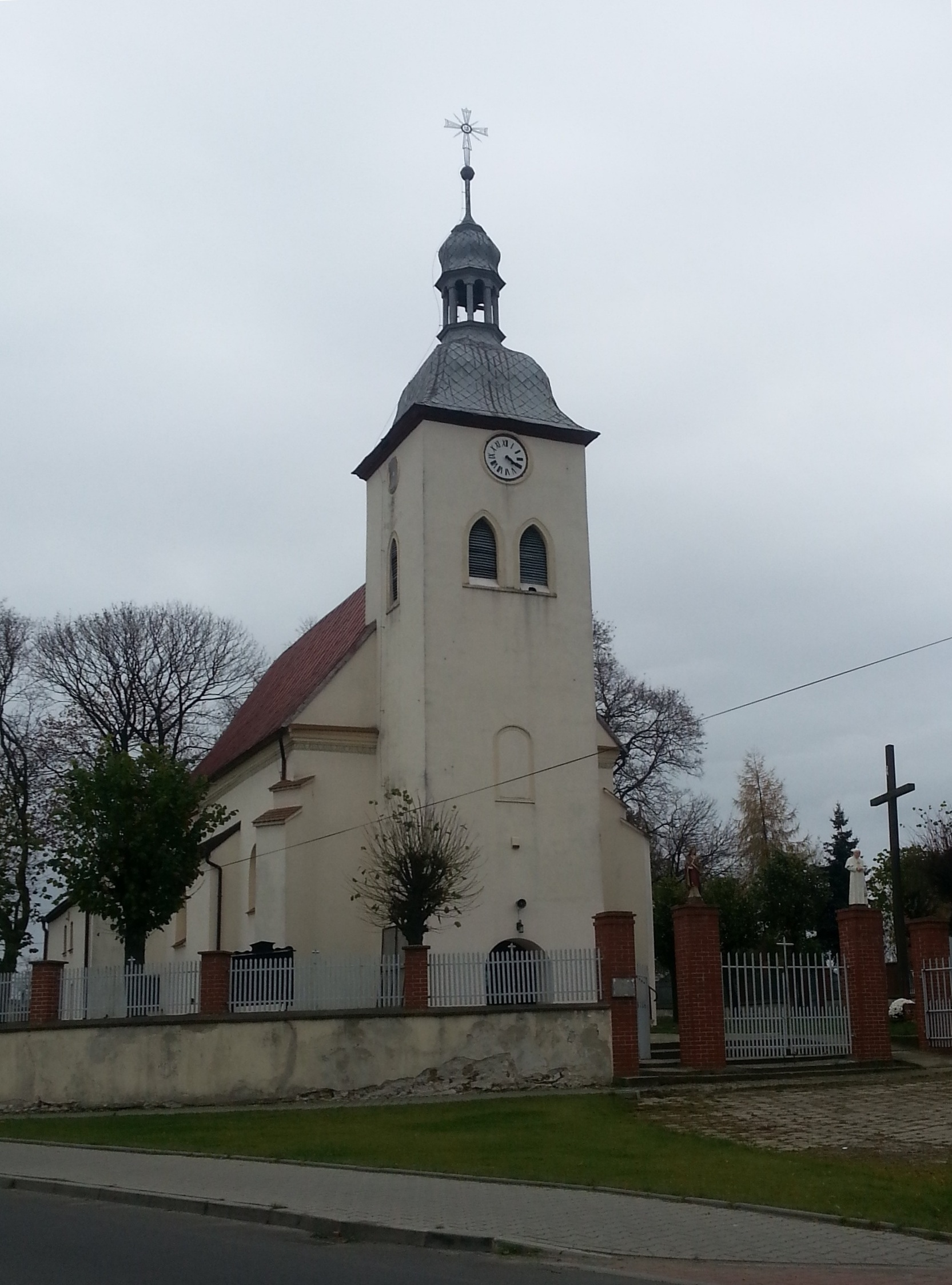 Chotów - kościół pw. św. Marcina, 1616